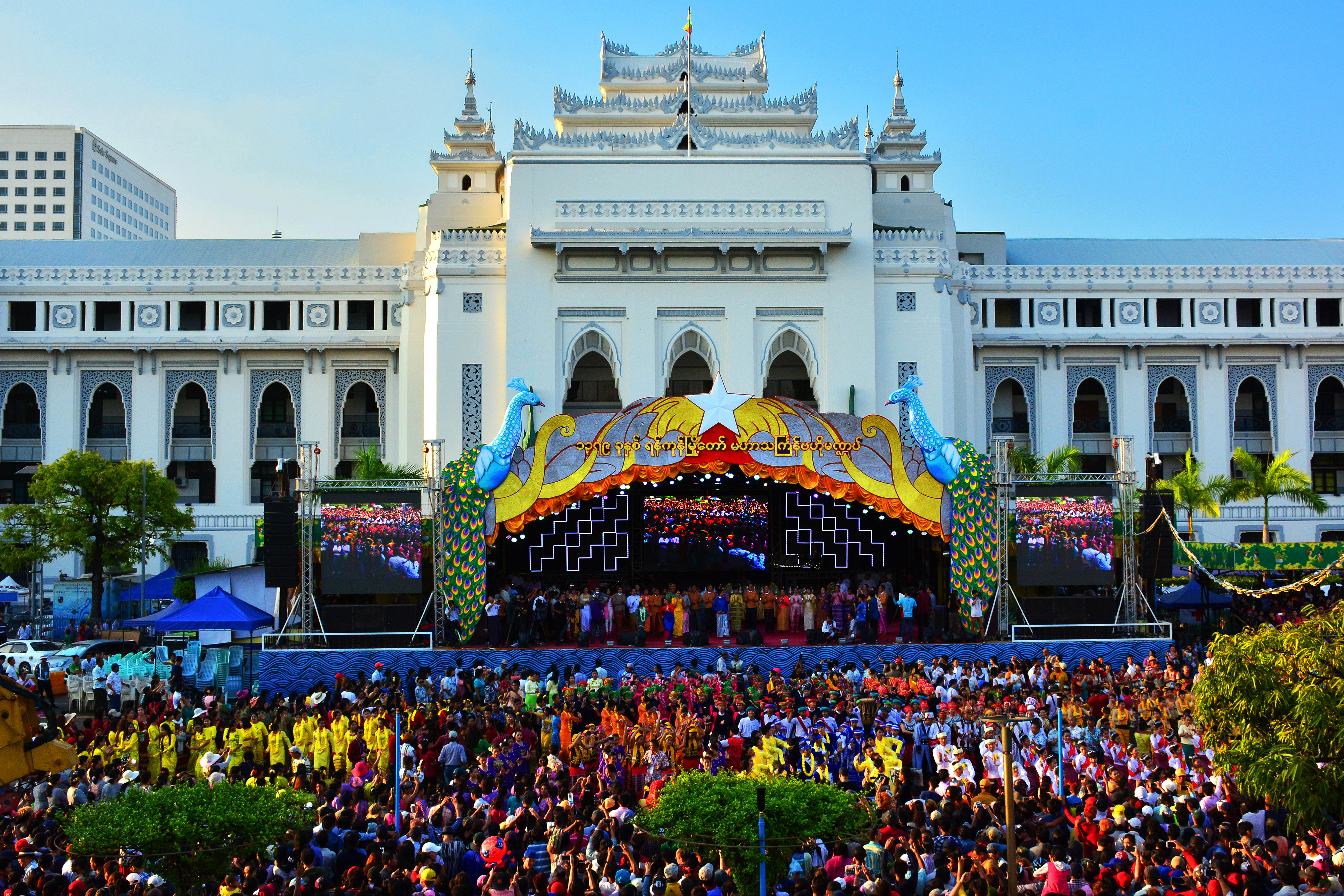 မြန်မာဘာသာ: သၾကၤန္ပိတ္ပြဲအခန္းအနား